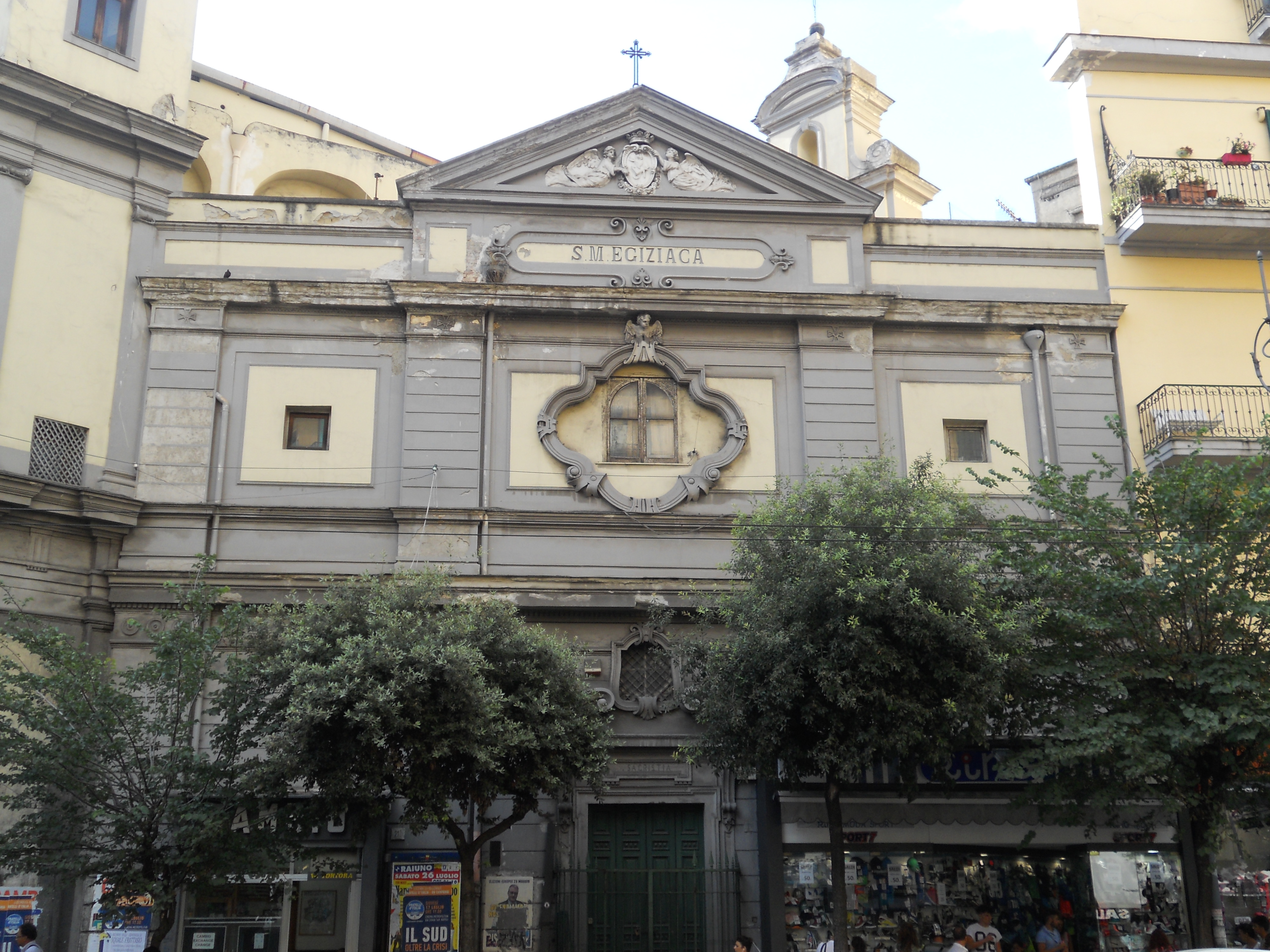 Prospetto destro della chiesa di Santa Maria Egiziaca all'Olmo, Napoli